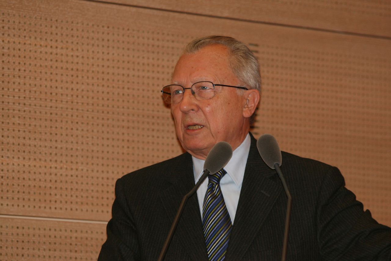 Jacques Delors lors d'une reunion de commémoration du 1er anniversaire de la mort d'André Wormser au palais du Luxembourg le 3 avril 2009.